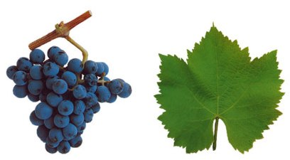 Traube und Blatt der Rotweinsorte 'Tinto_Cao'